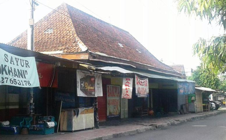 Stasiun Bantul dibangun pada tahun 1895 oleh Nederlands-Indische Spoorweg Maatschappij, salah satu perusahaan kereta api pertama di Hindia Belanda. Saat ini Stasiun Bantul sudah tidak difungsikan sebagai stasiun dan digunakan oleh masyarakat sebagai tempat berdagang.